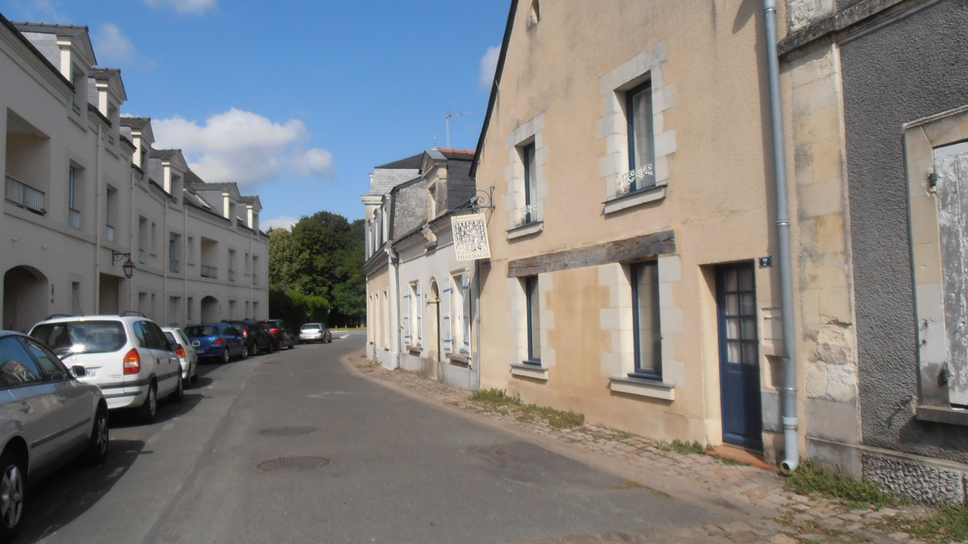 rue du centre reliant l'église à la mairie